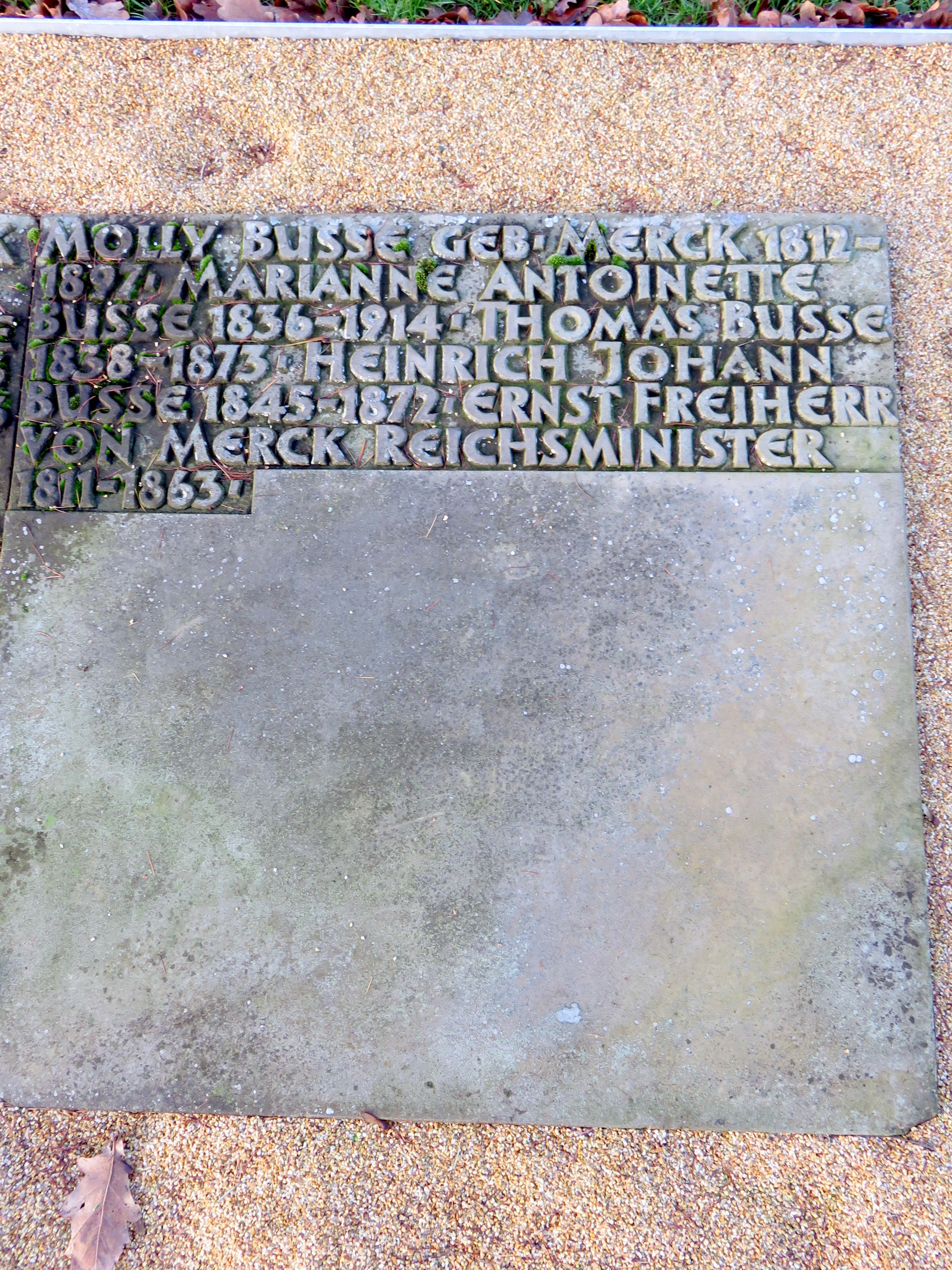 Doppel-Sammelgrab Familie Merck im Bereich des Althamburgischen Gedächtnisfriedhofs auf dem Hamburger Friedhof Ohlsdorf zu Ehren von unter anderen : Heinrich Johann Merck, seiner zweiten Ehefrau Marianne geborene Rohlffs und seines ältesten Sohnes Heinrich Johann Merck (1804-1835) aus der Ehe mit seiner früh verstorbenen ersten Ehefrau, Justus Ruperti und seiner Ehefrau Marie Pauline geb. Merck, Carl Hermann Merck und seiner Ehefrau Louise Susette, geb. Godeffroy, Ernst Freiherr von Merck sowie seiner Schwester Molly Busse (1812-1897).